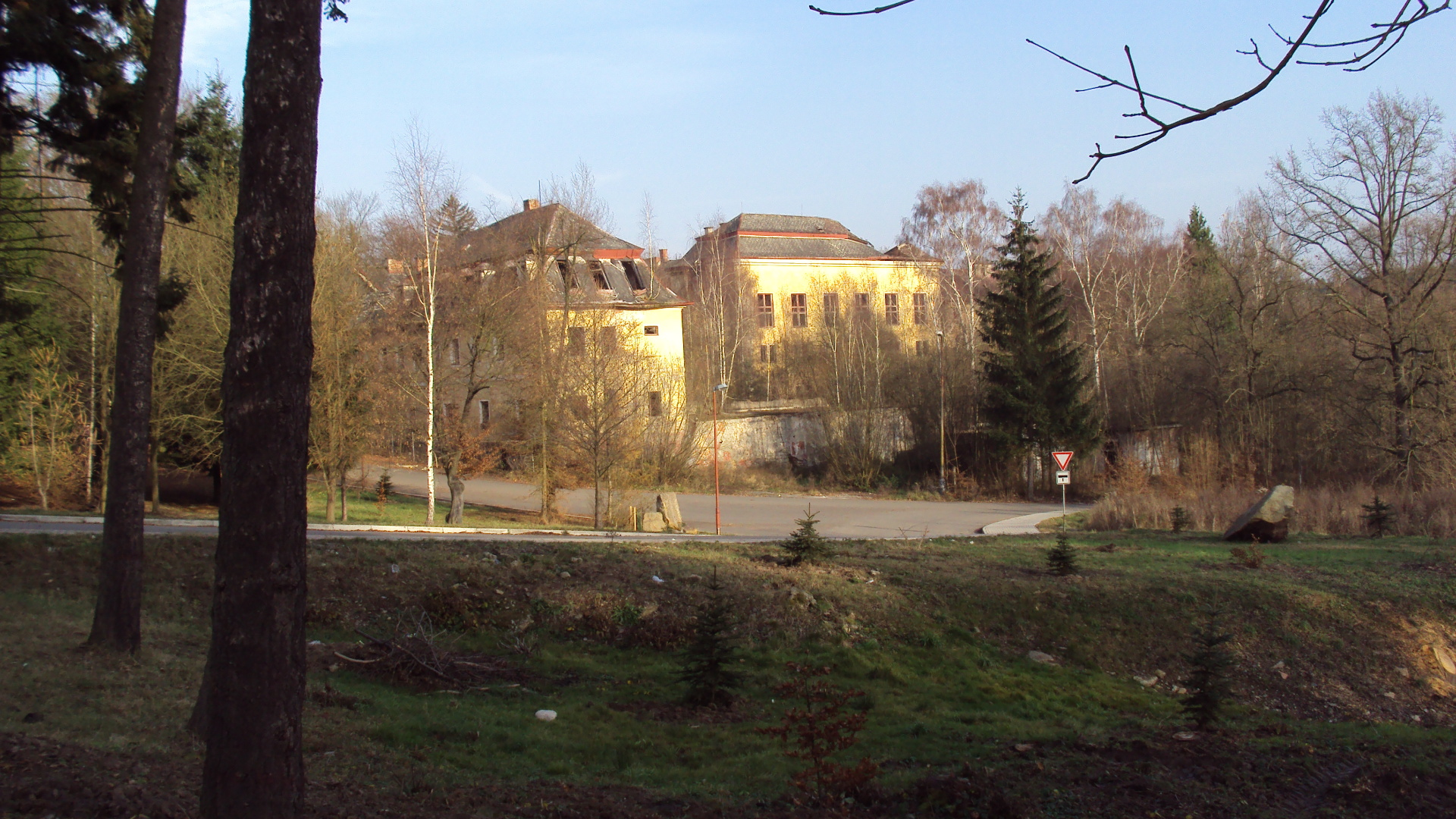 Bývalý zámeček v Nových Zákupech zdálky, odtud ruinu nepoznáš